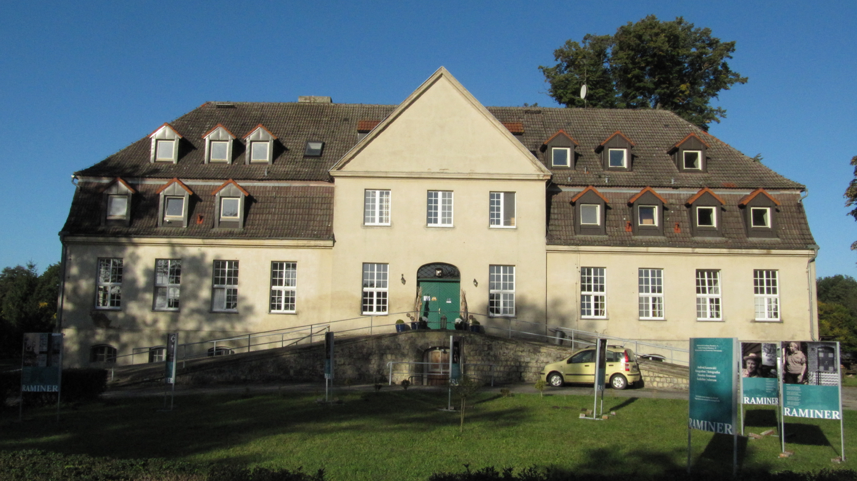 Ramin, Mecklenburg-Vorpommern, Gutshaus